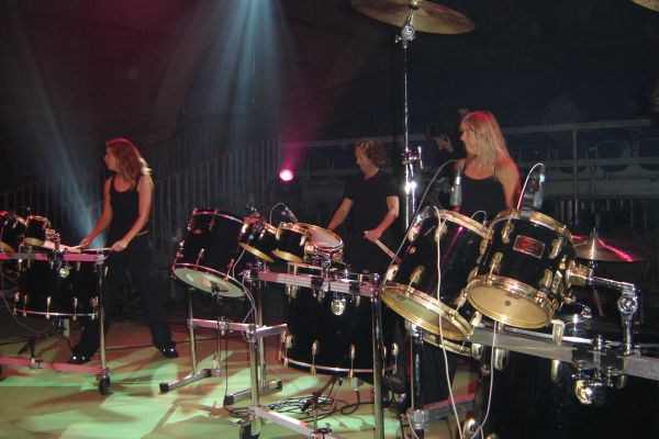 Optreden Slagerij Van Kampen